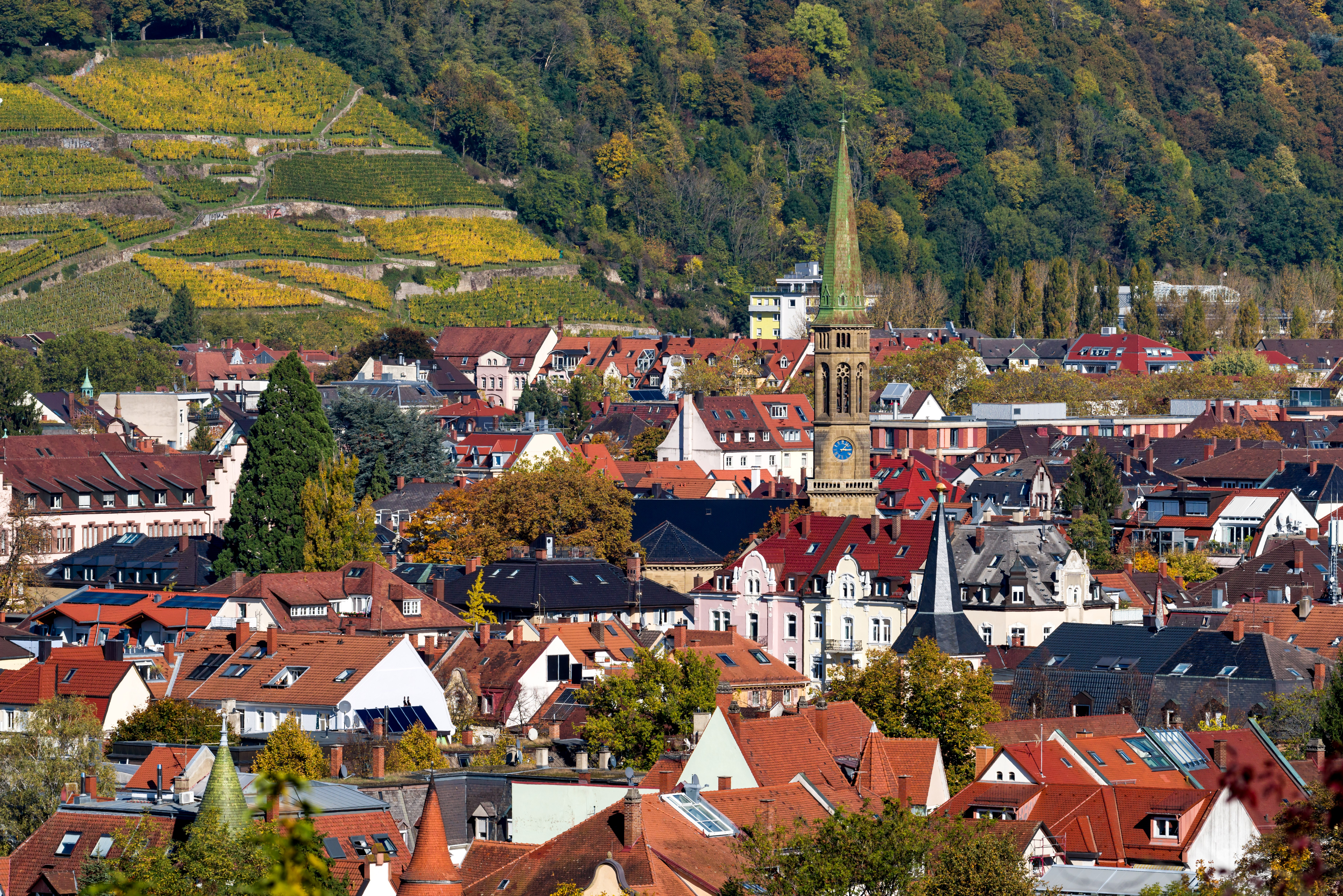 Bilder aus Niederschopfheim Brunnen